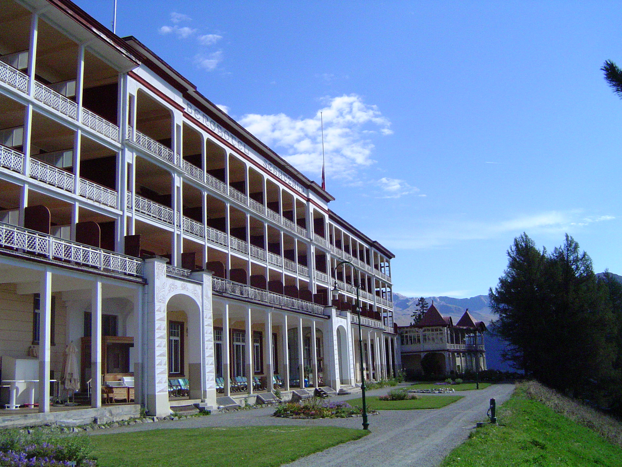 Davos, Berghotel Schatzalp voorgevel naar rechts gezien